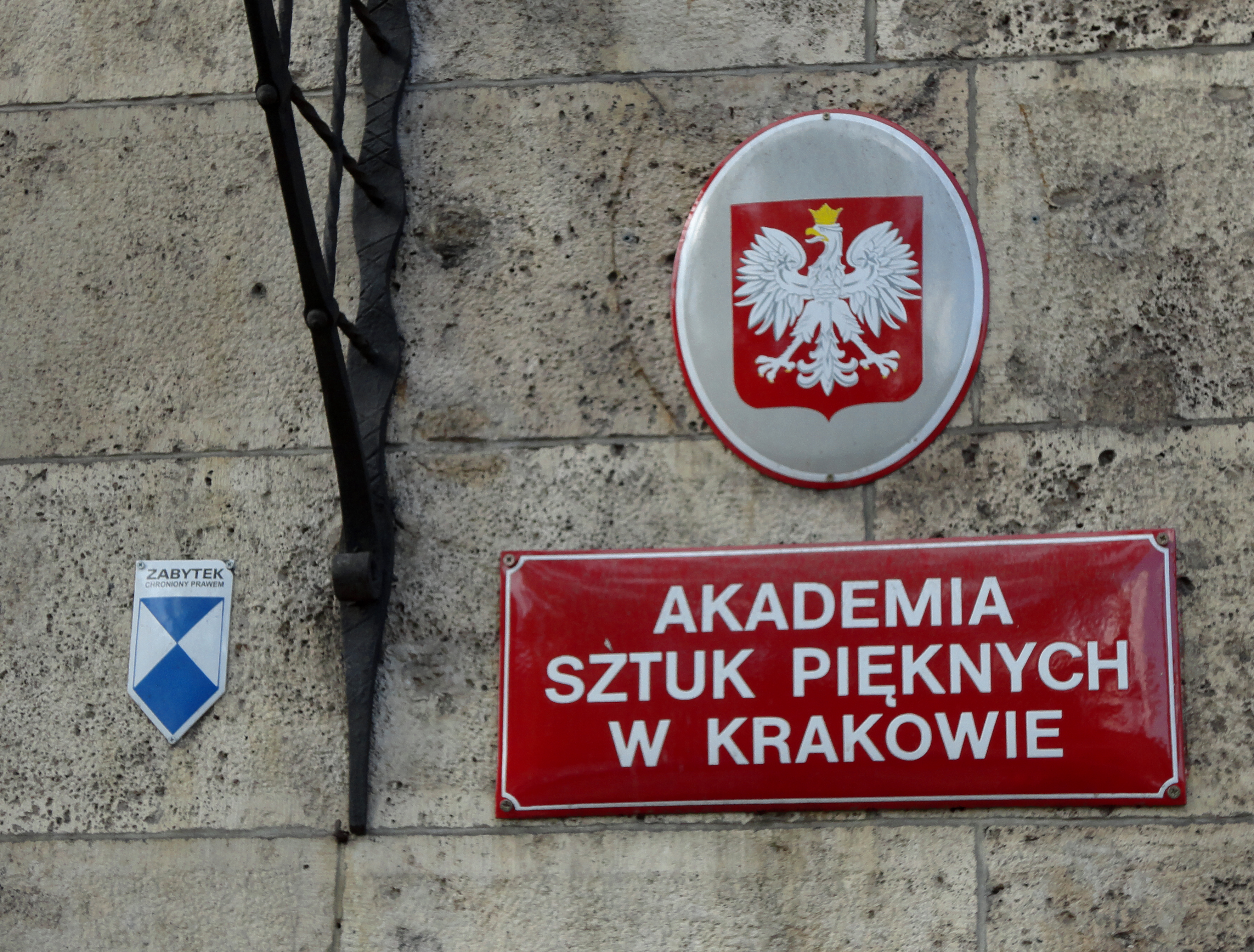 Névtábla és lengyel címer a Krakkói Képzőművészeti Akadémia Smoleńsk utca épületén